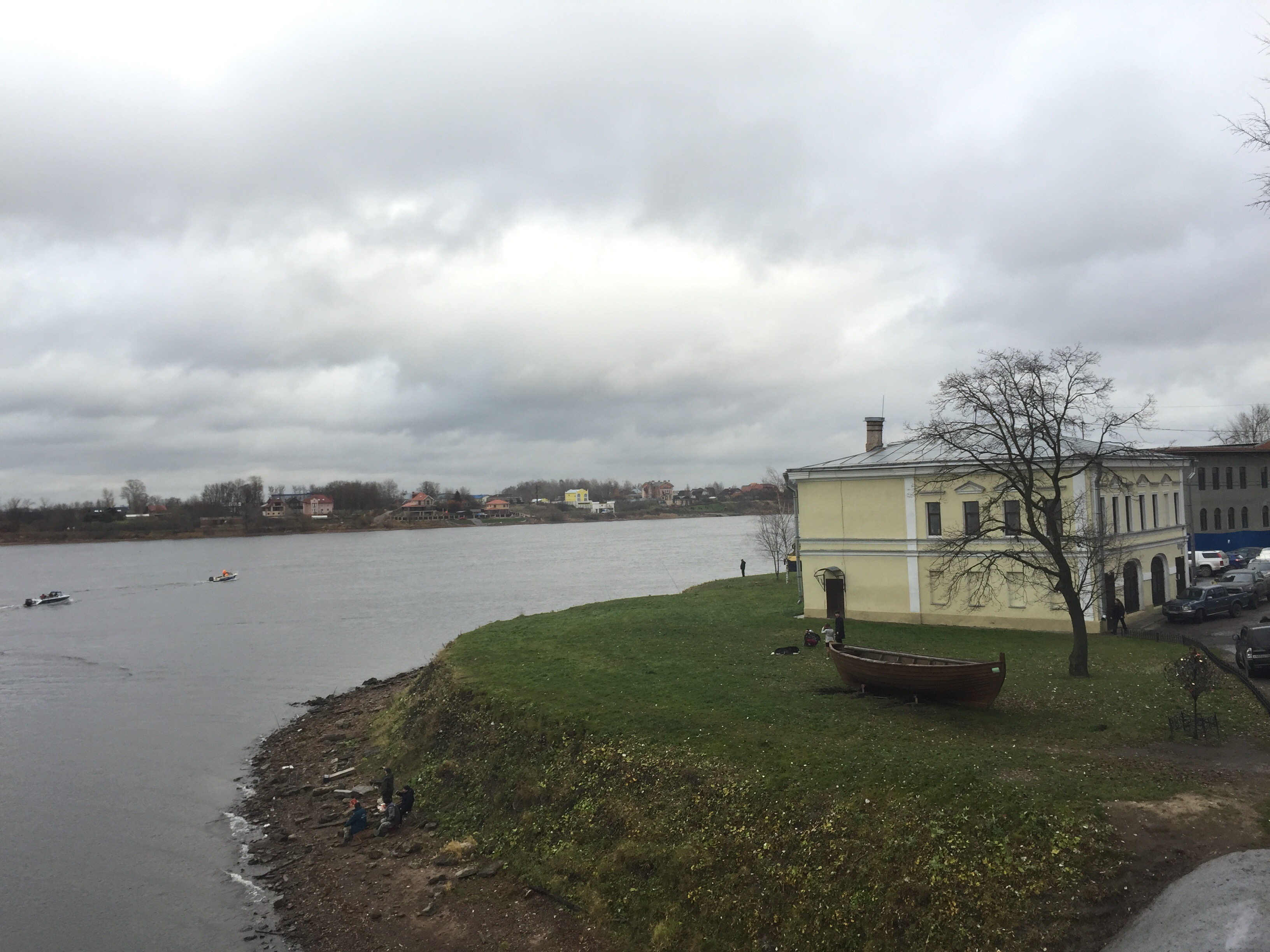 Музей диорама Невской битвы